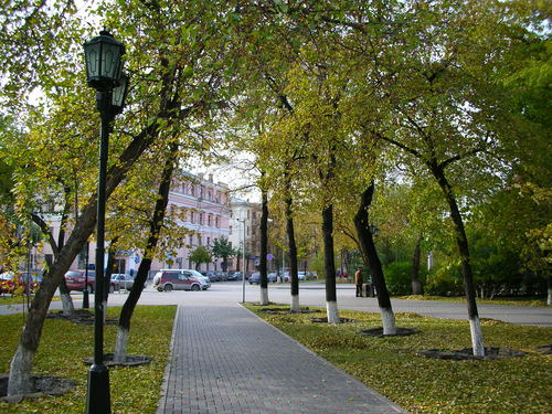 Центральная площадь Тюмени, вид на перекрёсток ул. Республики и 8 Марта (здание Главпочтамта)